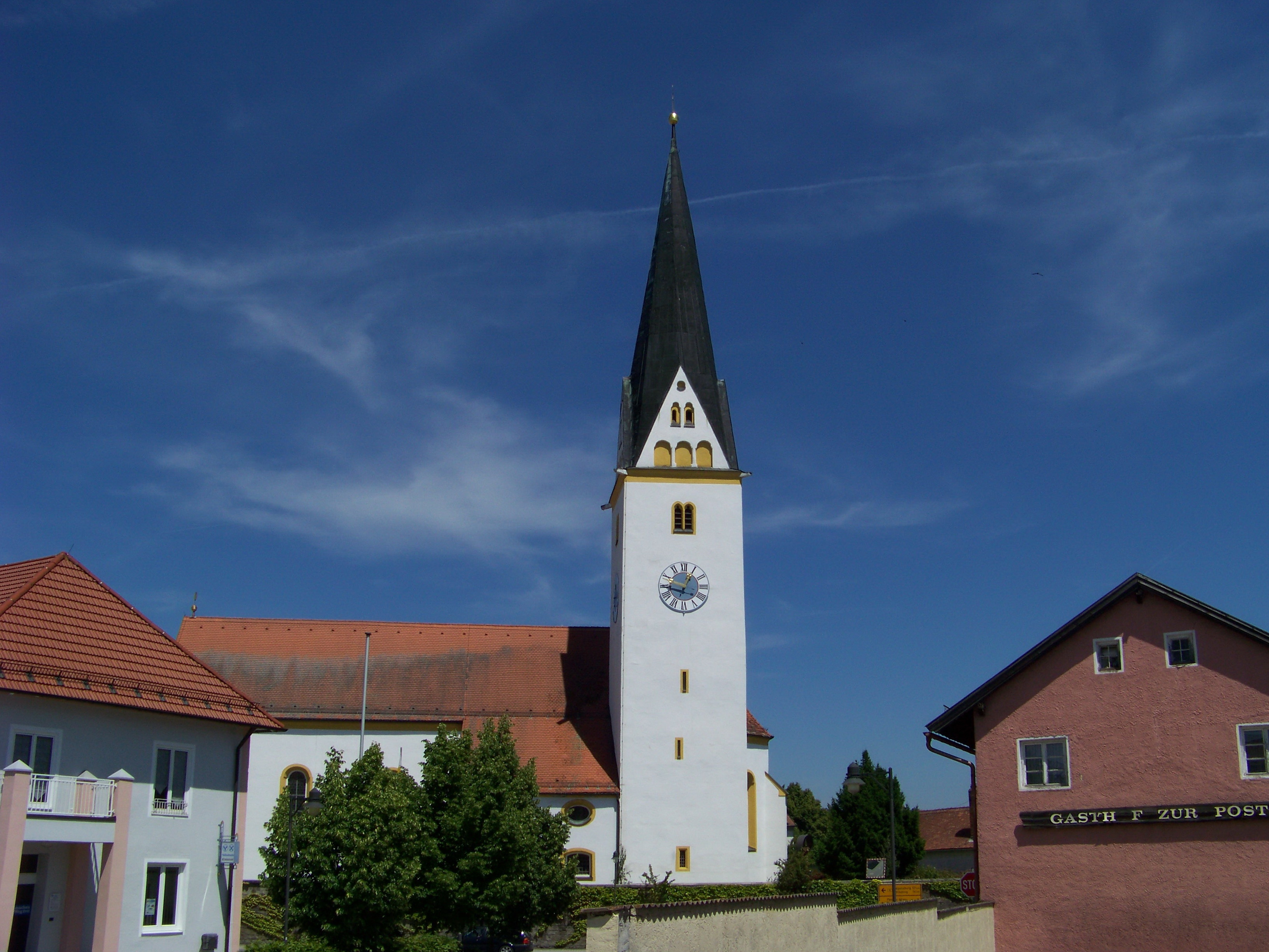 Straßkirchen, Kirchplatz 2. Katholische Pfarrkirche St. Stephan, Turm 14. Jahrhundert, Chor und Langhaus 15. Jahrhundert, 1685 barockisiert, Verlängerung der Anlage 1888; mit Ausstattung; Sakristei 1513.